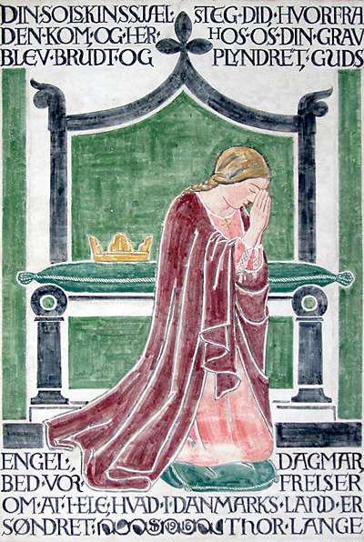 Mindetavle for Dronning Dagmar i St. Bendts Kirke , Ringsted, Denmark